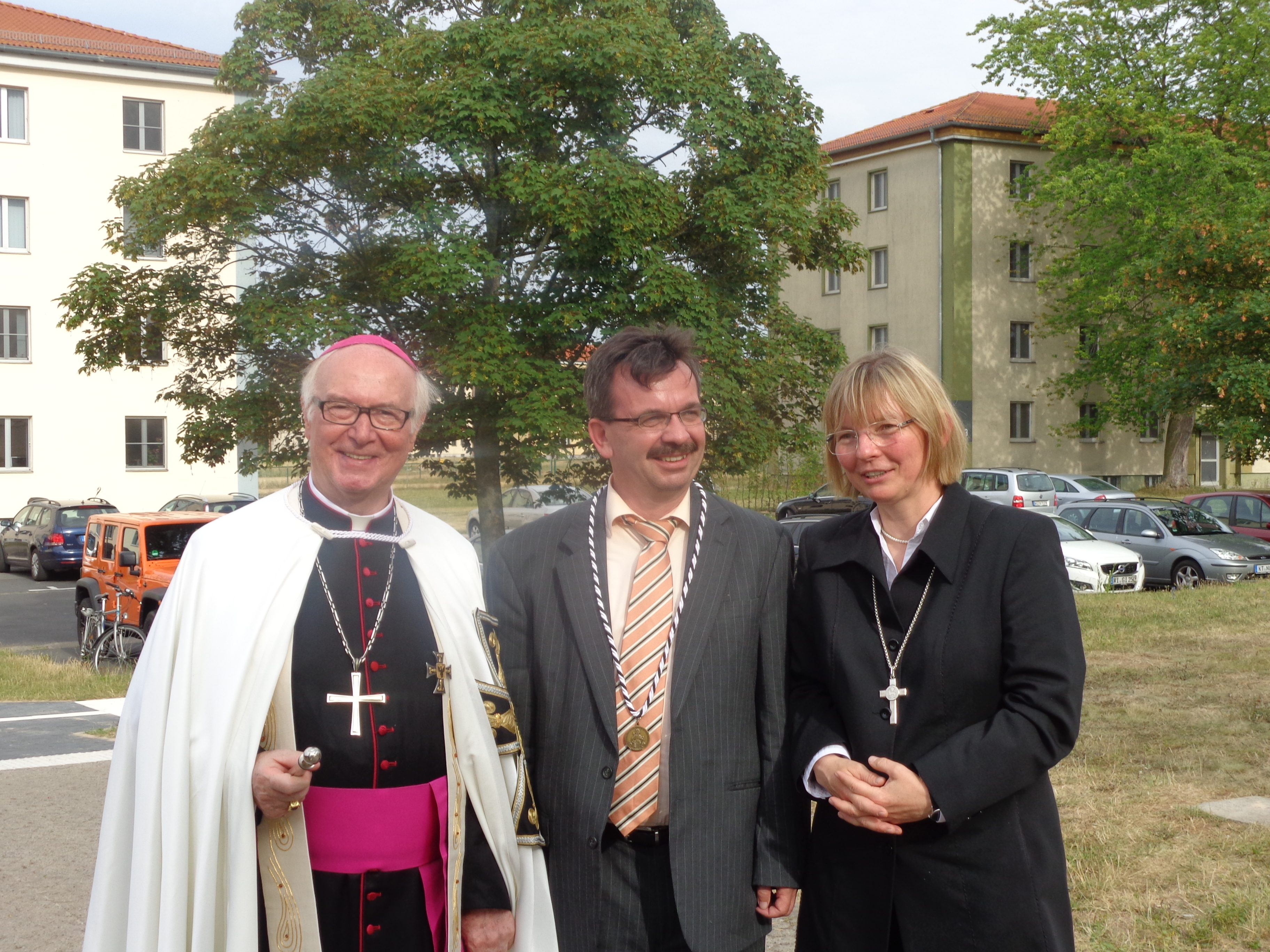 Bruno Platter, Helmut Flachenecker und Edda Weise bei der Einweihung der Forschungsstelle Deutscher Orden in den ehemaligen Leighton Barracks, Würzburg